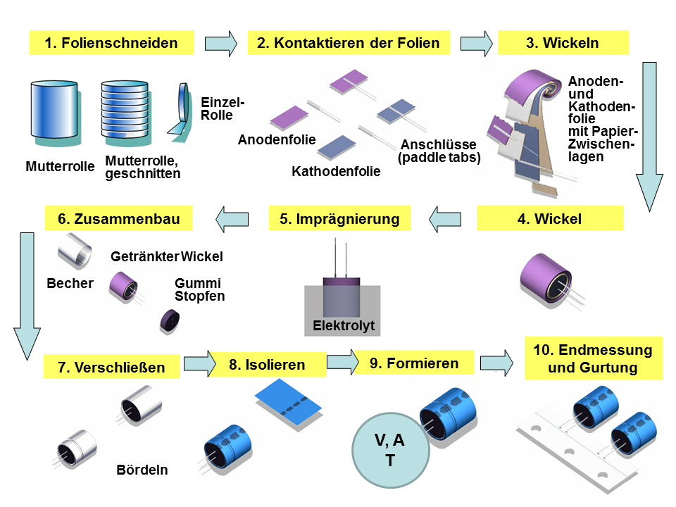 Produktionsablauf der Herstellung von Al-Elektrolytkondensatoren mit flüssigem Elektrolyten